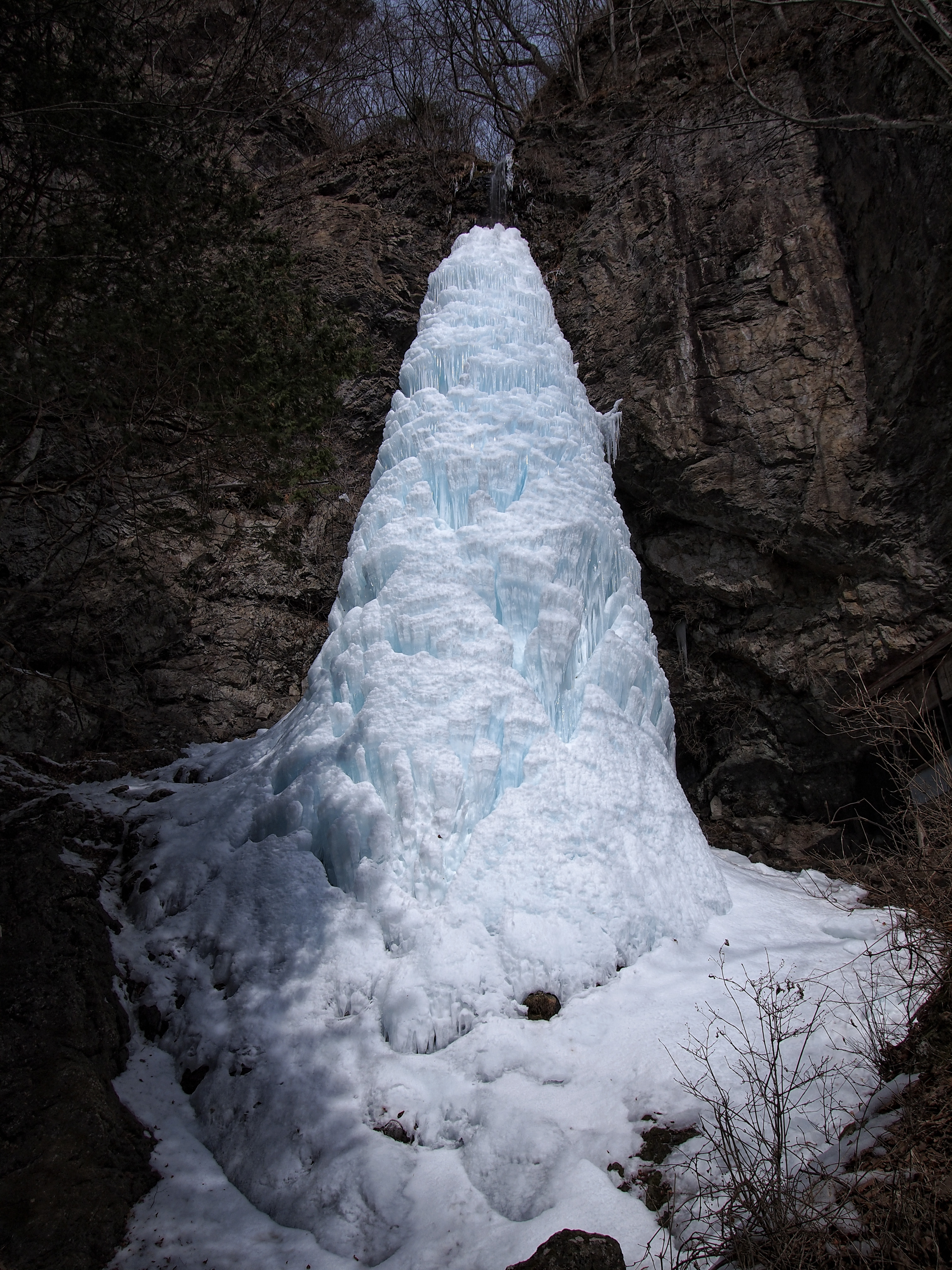 大禅の滝の大氷柱